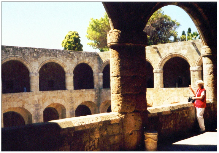 In'n Grootmesterpalast up de Insel Rhodos